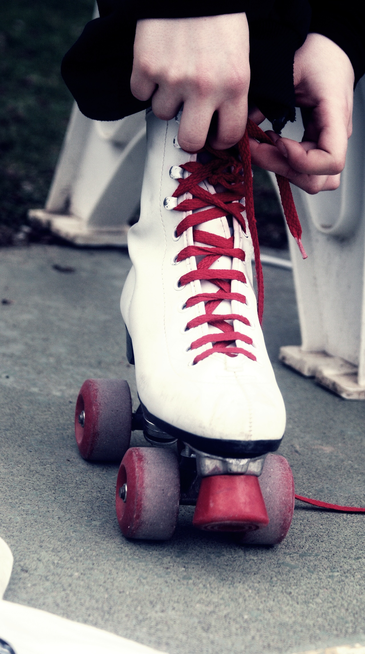 Ejemplo de encuadre vertical